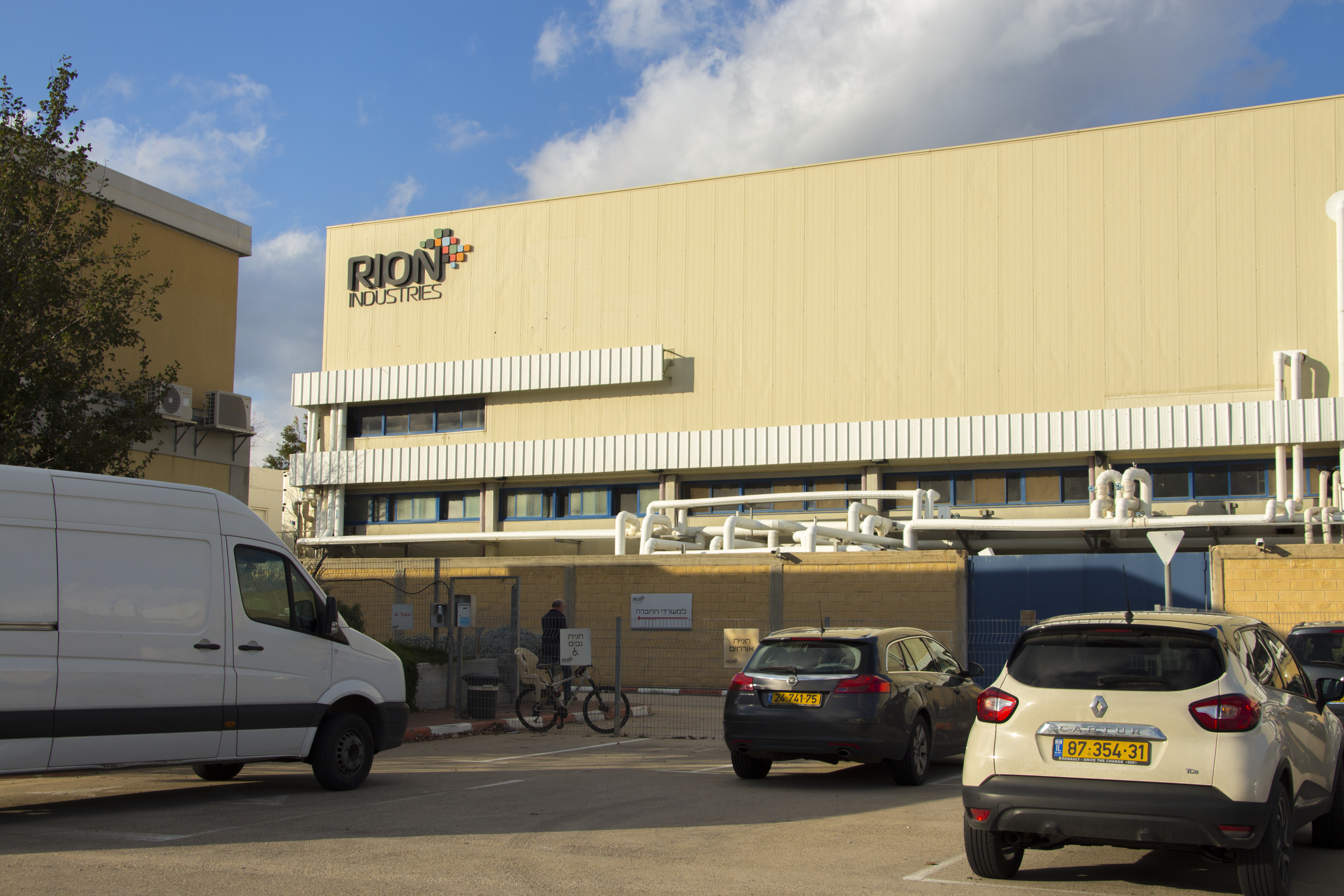 תעשיות ריאון, קיבוץ כברי, מקבוצת פלסאון, מספקת מוצרי פלסטיק מורכבים וטכנלוגיים בקבלנות משנה לשוק המקומי והבינלאומי.